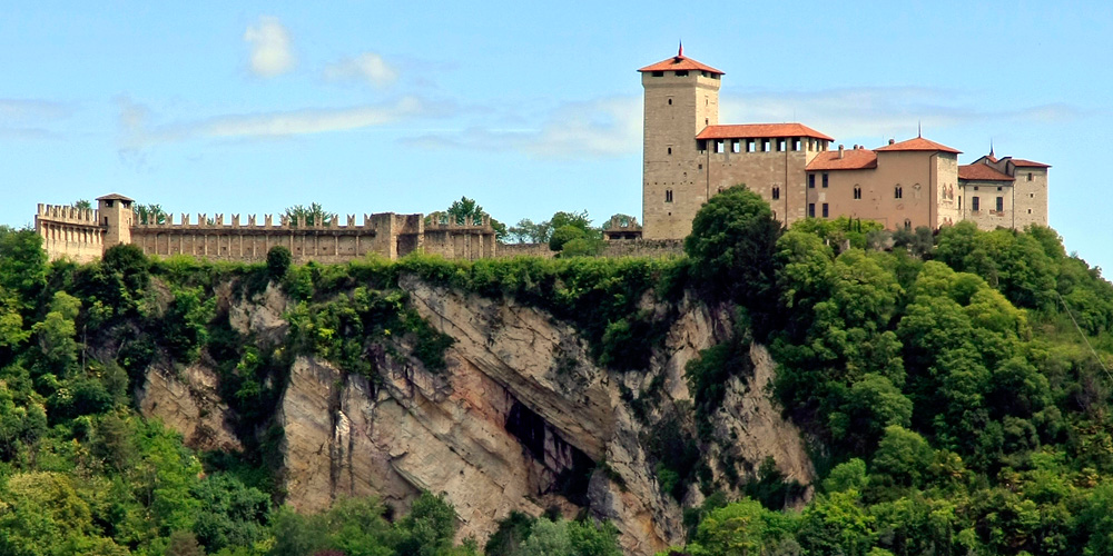 La rocca di Angera vista da Arona, sulla sponda opposta del lago Maggiore